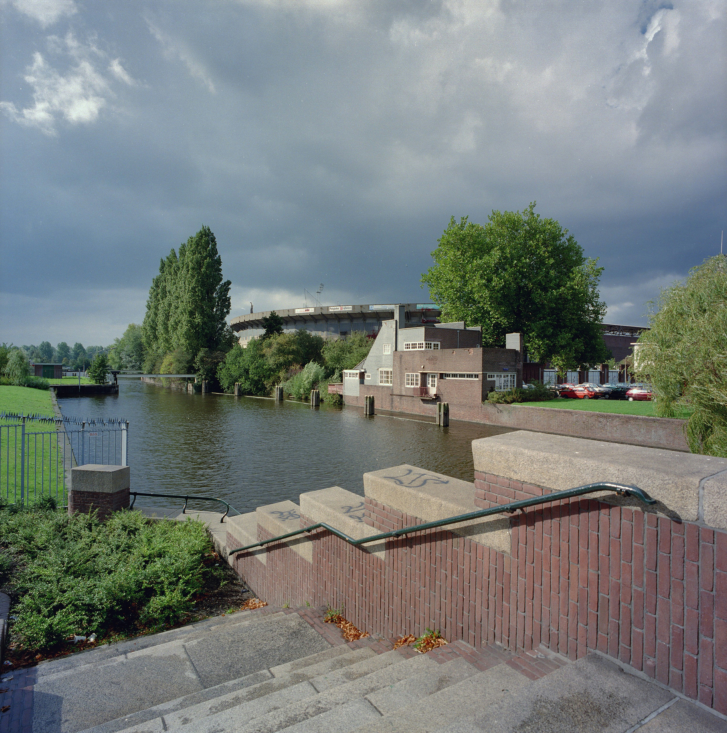 OLYMPISCH STADION: Exterieur OVERZICHT OMGEVING VAN HET STADION